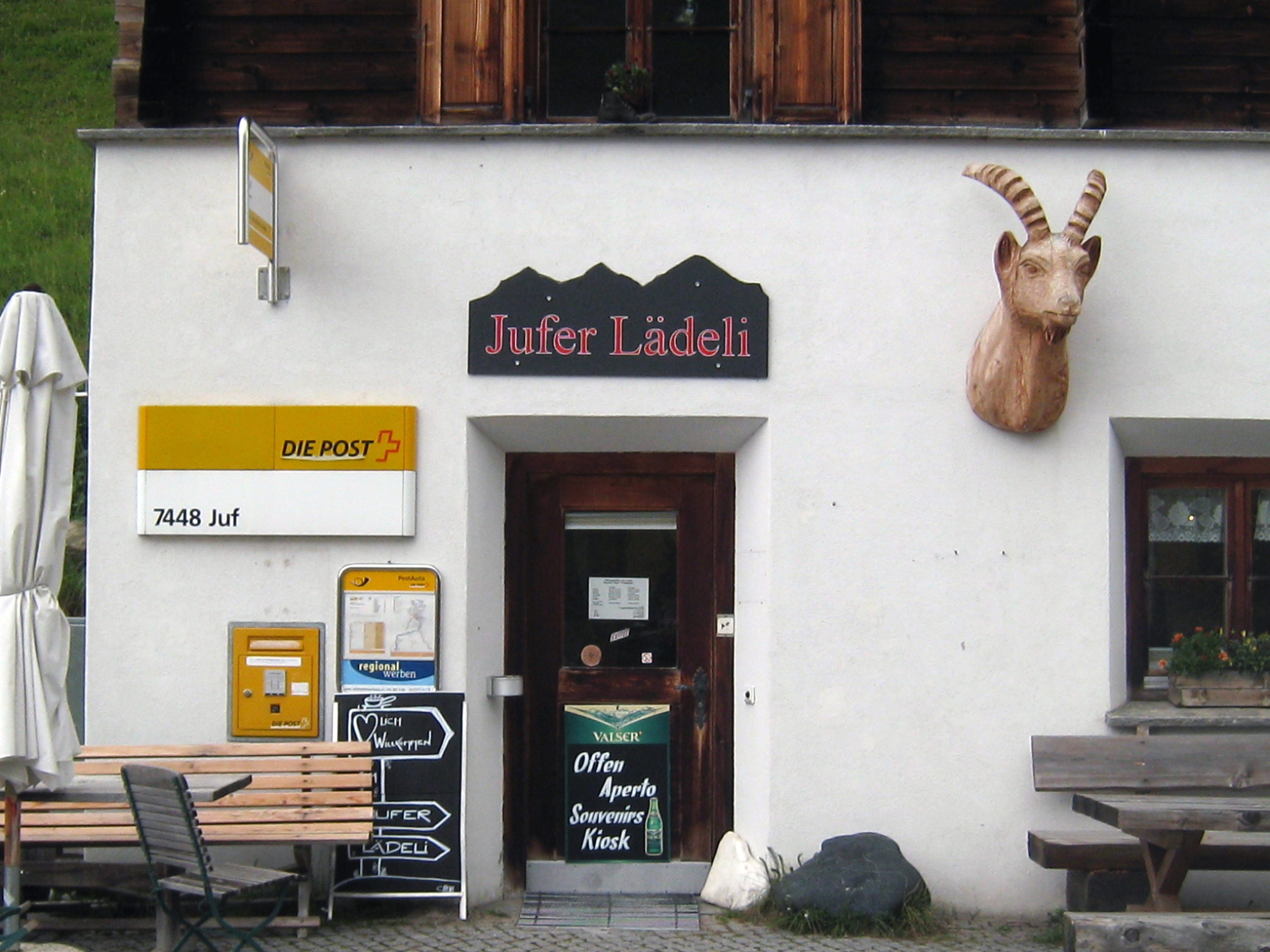 Juf, Schweiz